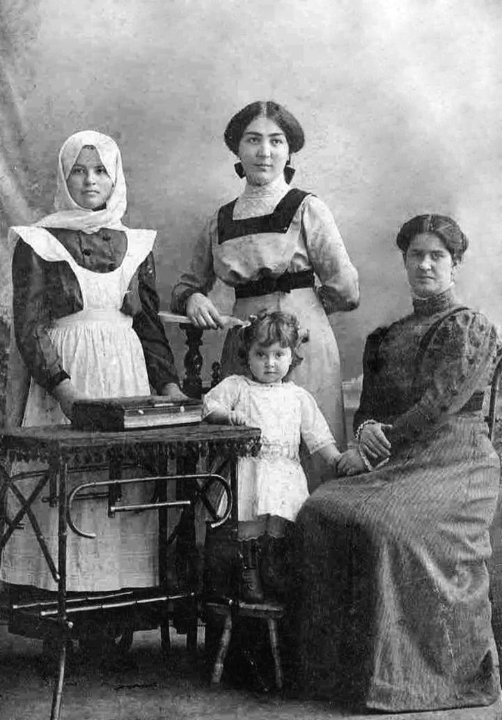 Мать скульптора Бади Бекузарова в верхнем ряду в центре